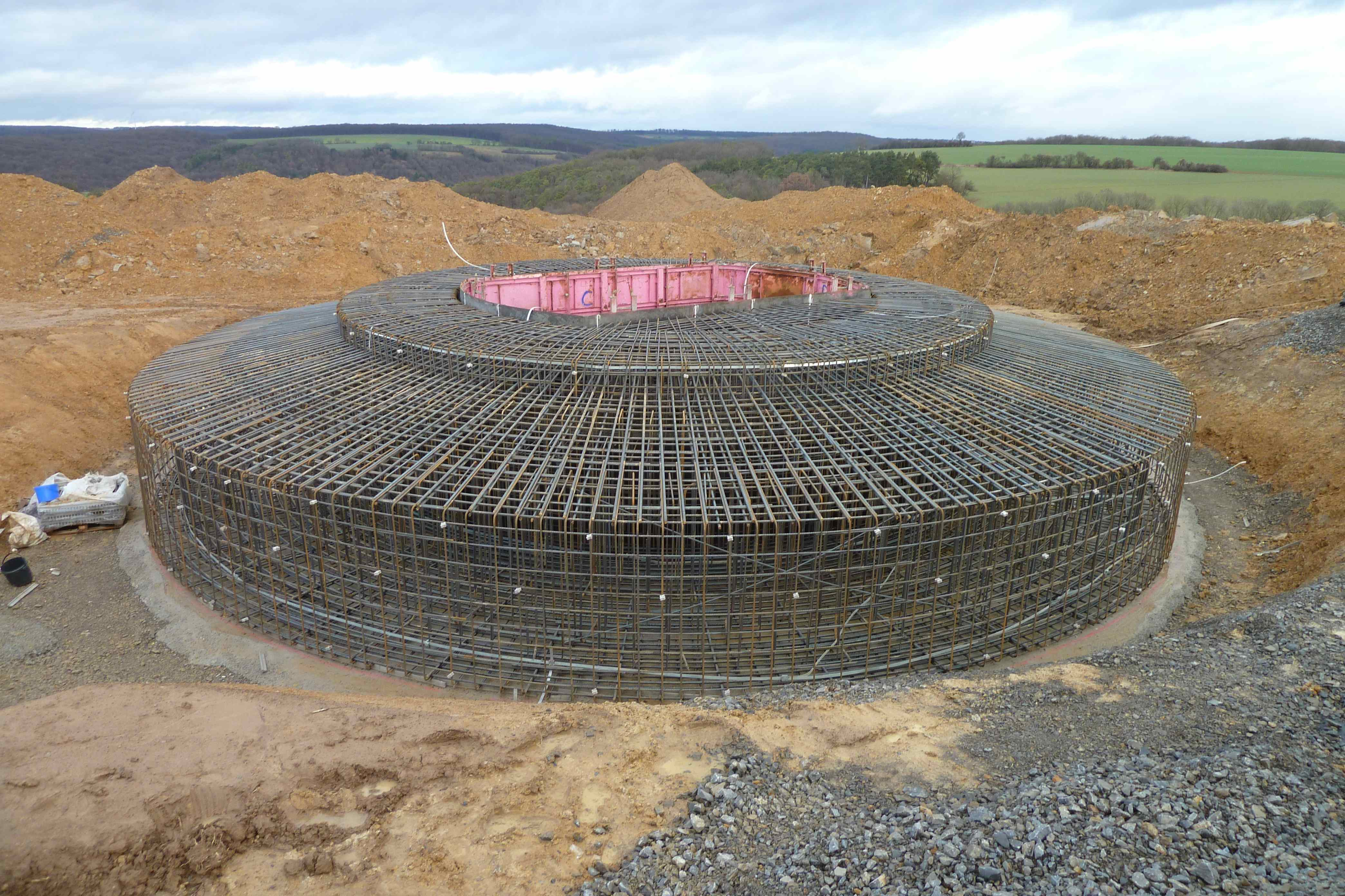 Bewehrung eines Fundamentes einer Windenergieanlage bei Schonungen